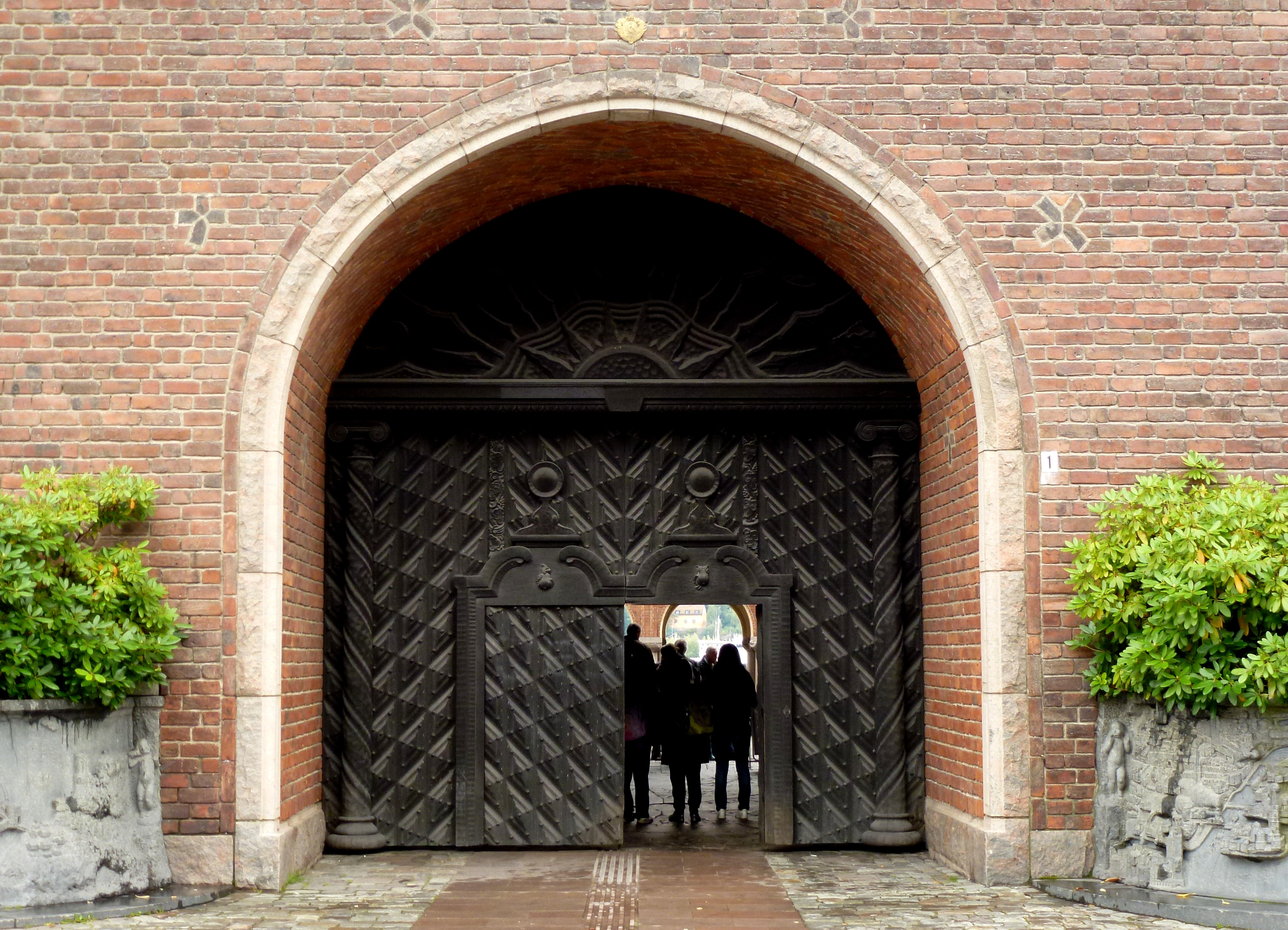 Huvudportal, norra fasad